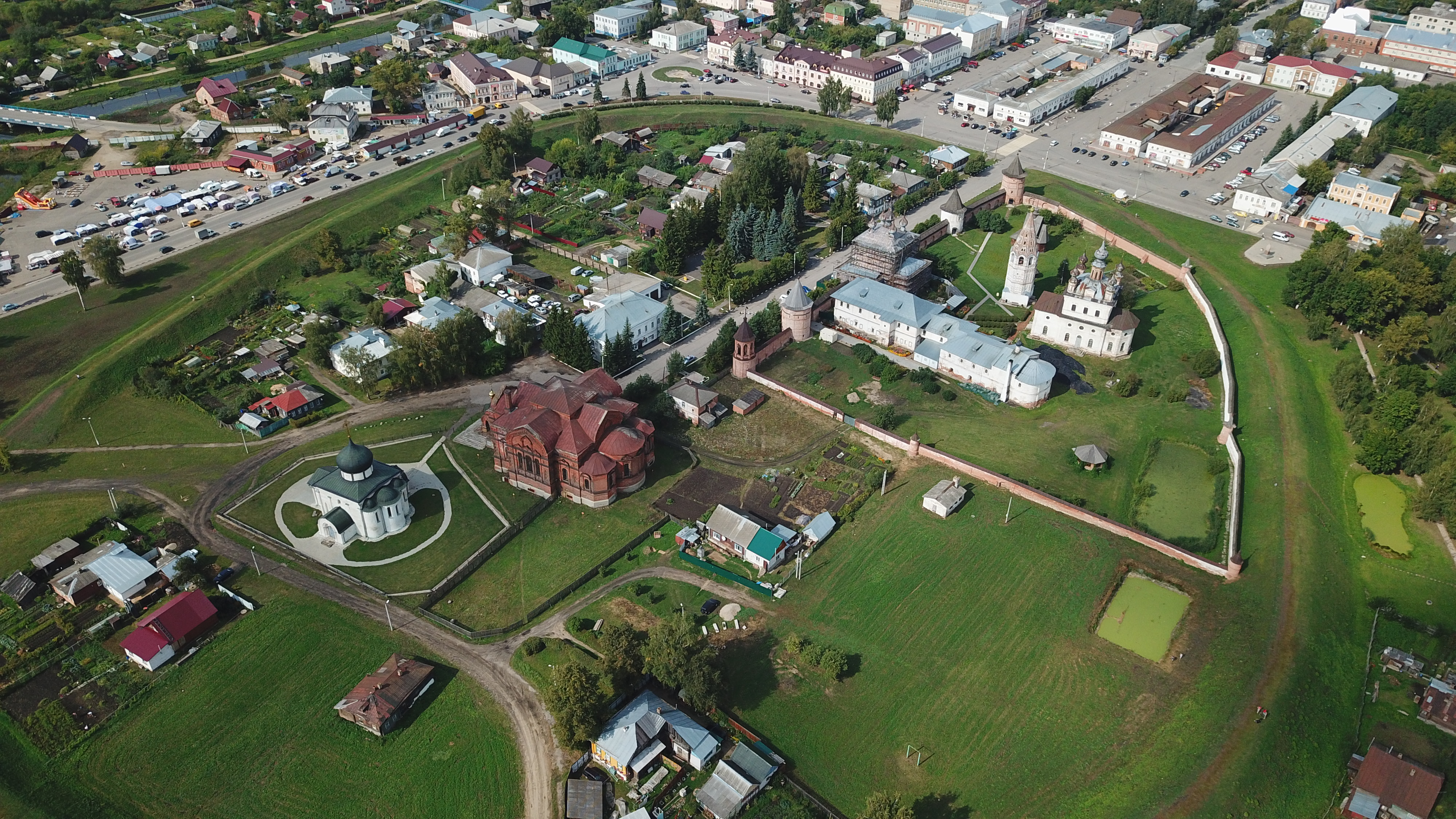 Юрьев-Польский. Михаило-Архангельский монастырь